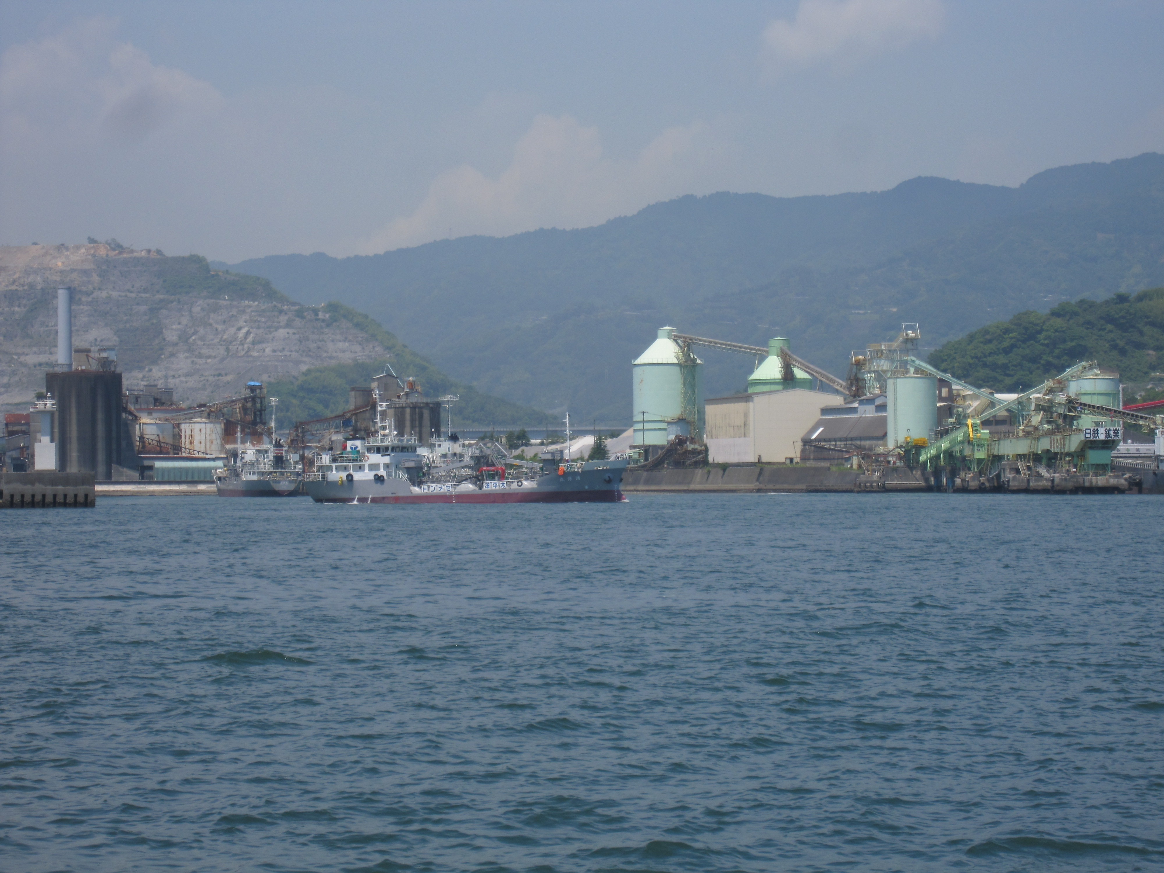 堅浦地区から撮影 Canon IXY Digital 510 IS